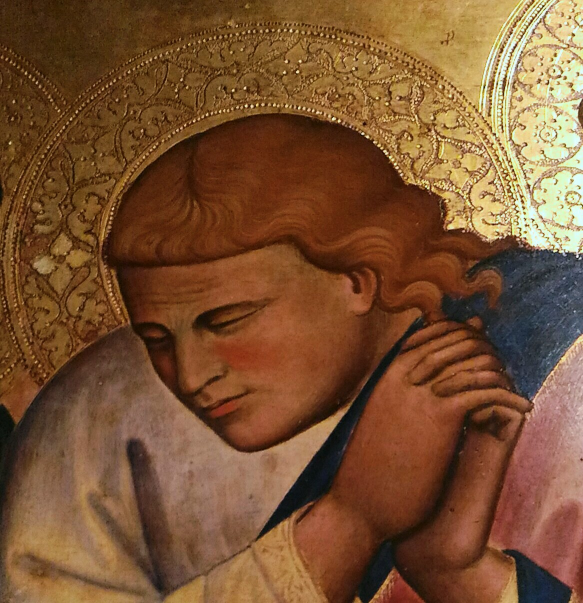 di Niccolò di Pietro Gerini 1370-75, tempera e oro su tavola